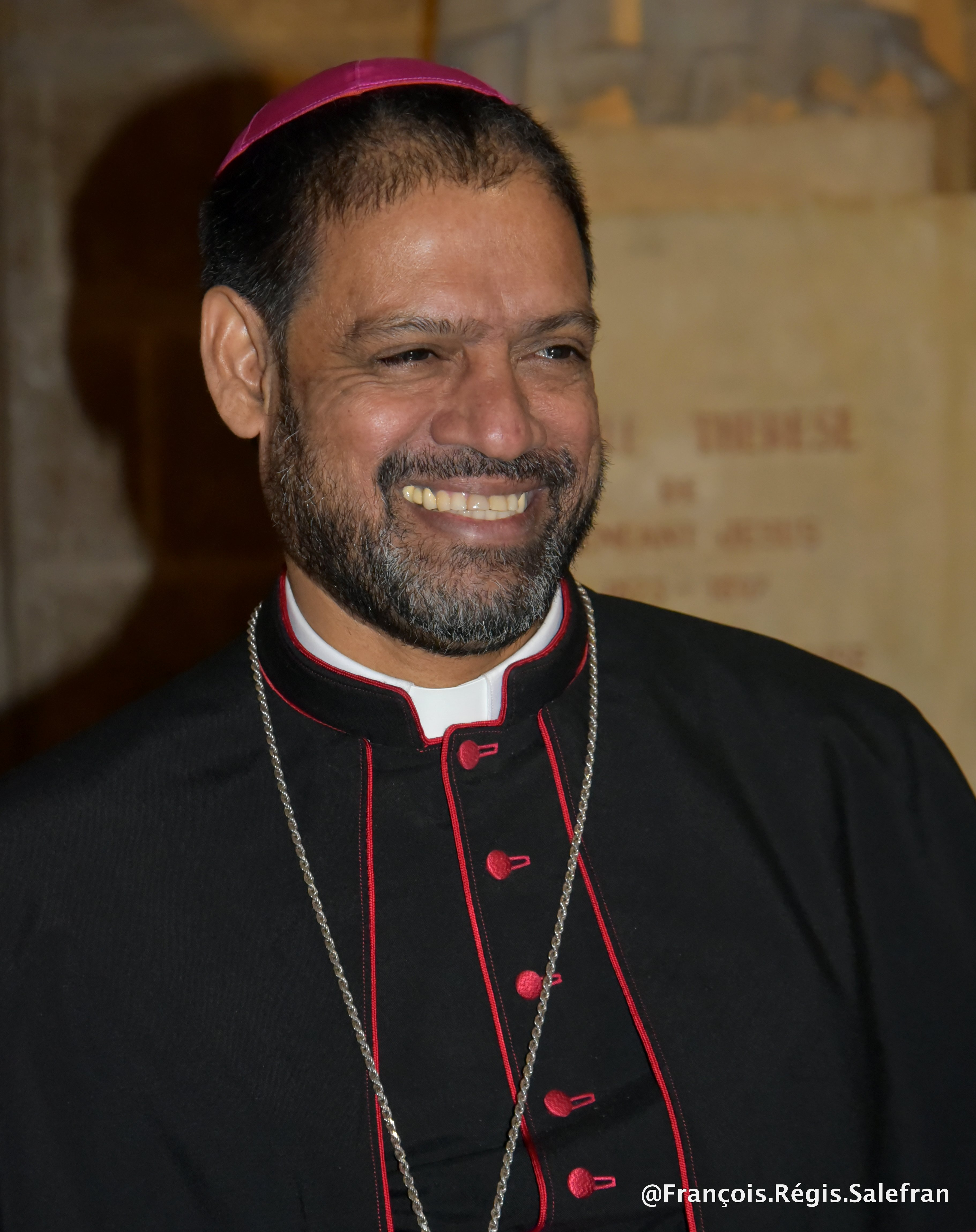 Mgr Théodore Mascarenhas lors de la 11ème Nuit des Témoins d'Aide à l'Église en Détresse à Paris.